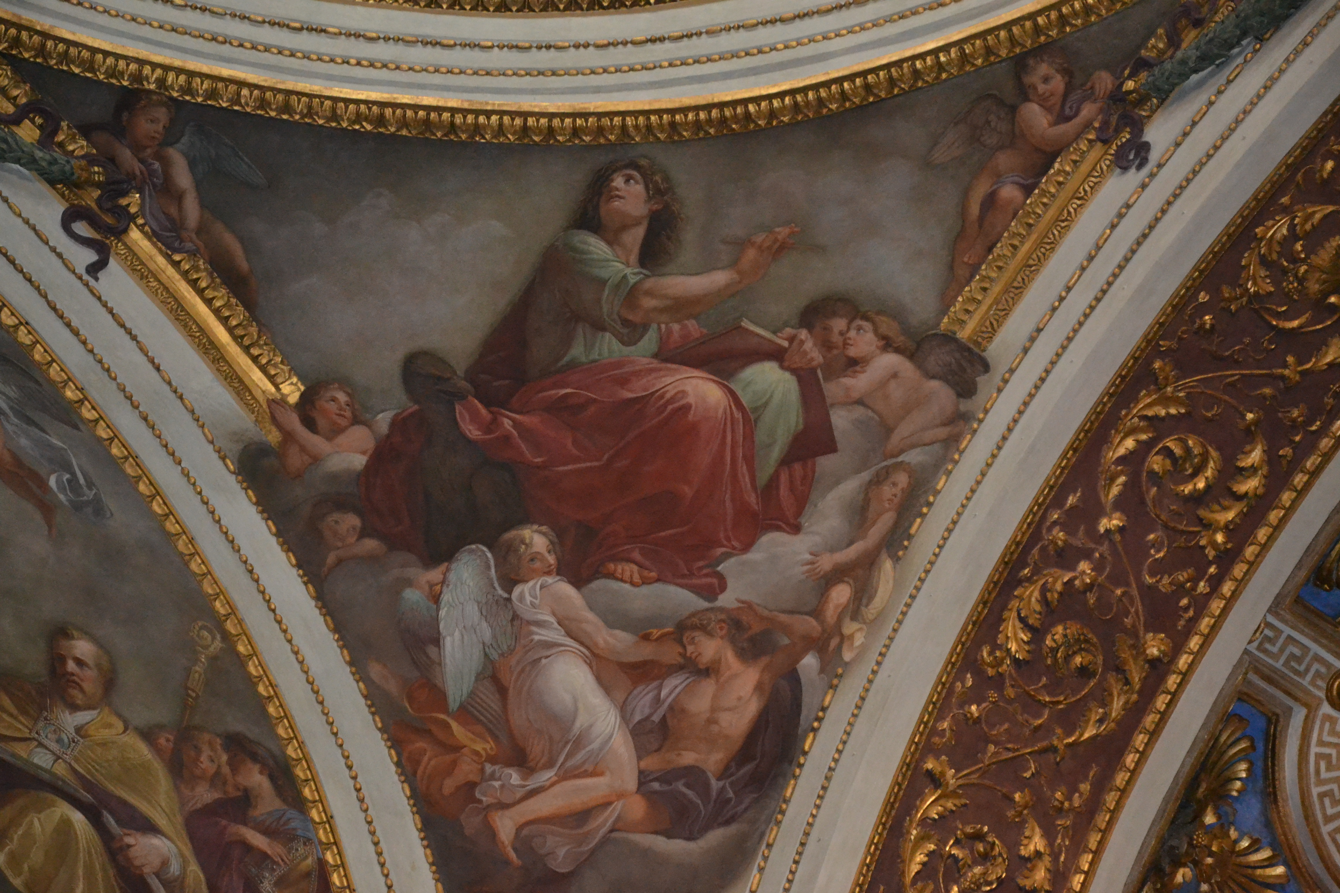 Interno della chiesa di Santa Maria dei Miracoli a Milano,Cupola, affreschi di Andrea Appiani